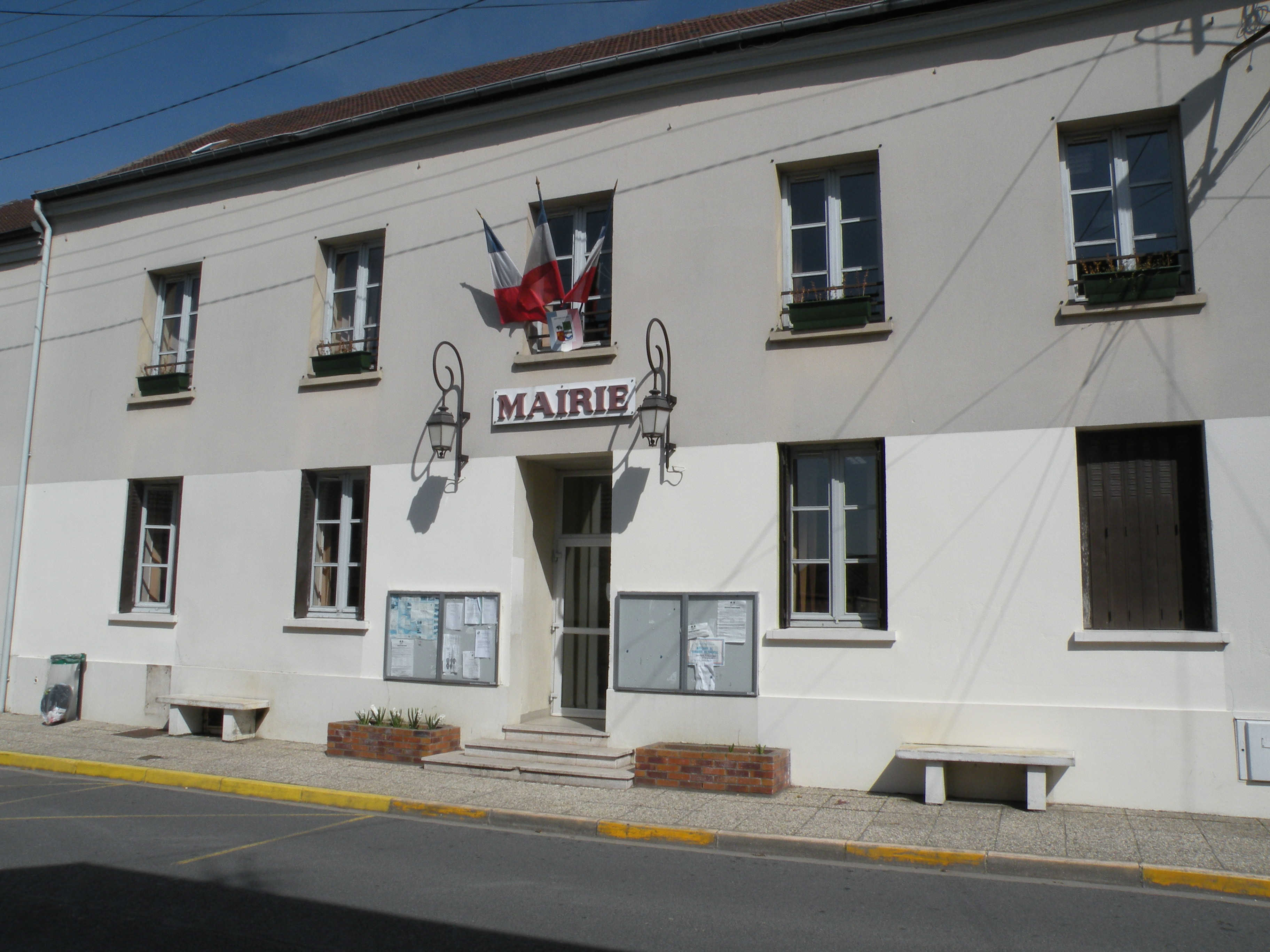 mairie de Bruyères-sur-Oise, val d'oise, france